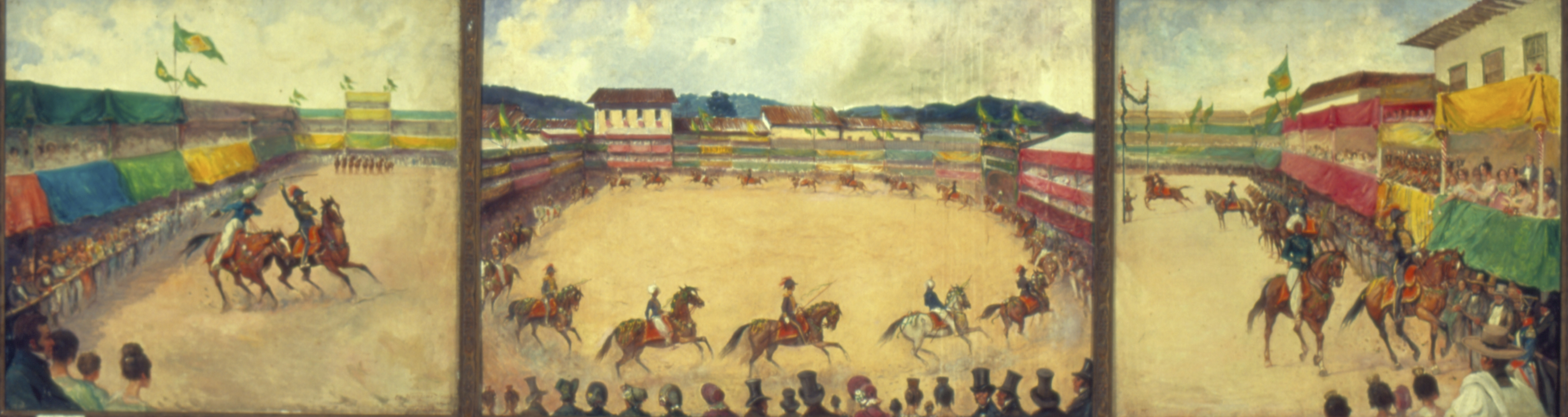 Obra que integra o acervo do Museu Paulista da USP. Coleção Fundo Museu Paulista - FMP